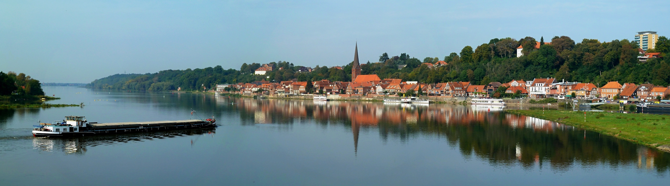 Die denkmalgeschützte historische Altstadt von Lauenburg an der Elbe